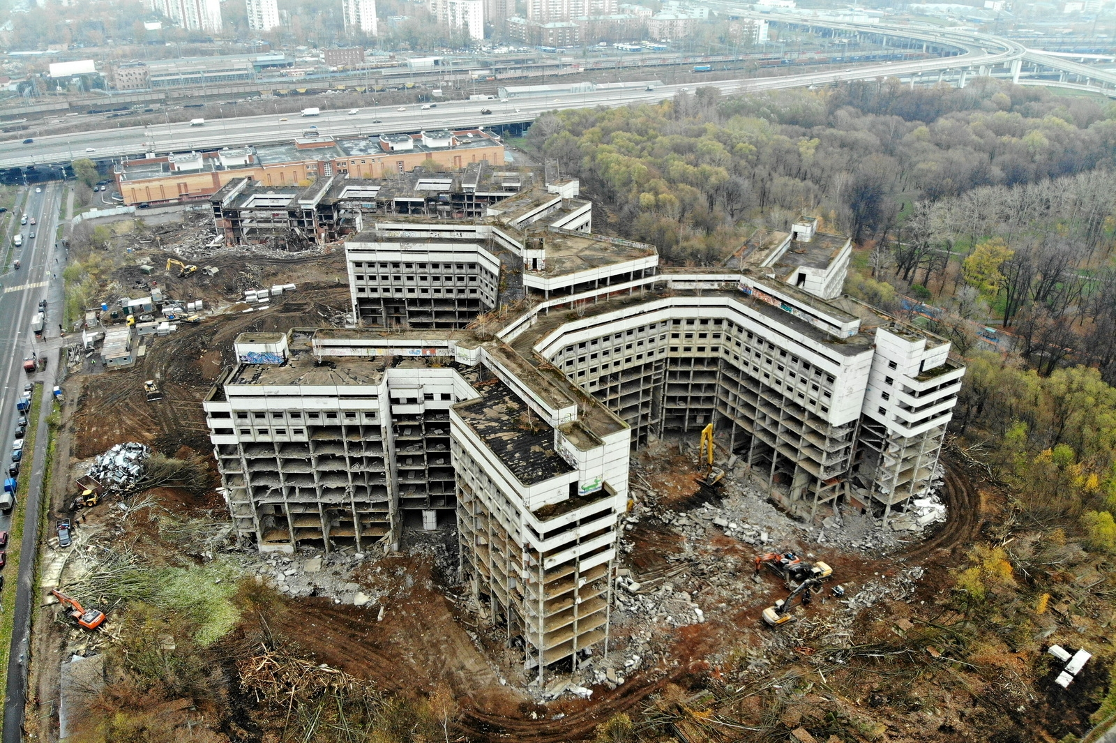 Снос Ховринской больницы